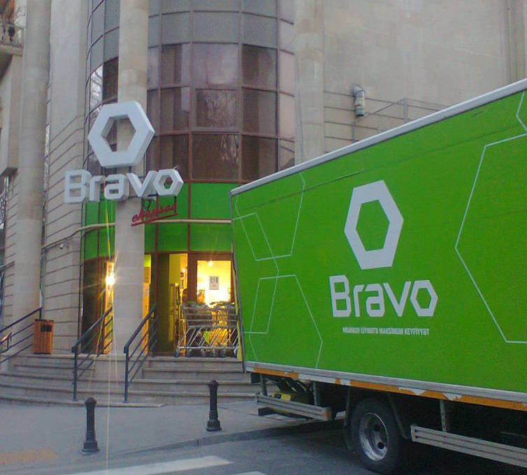 Это фото азербайджанского супермаркета BRAVO